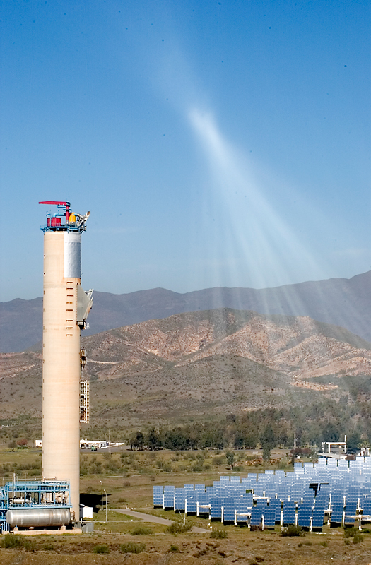 Torre CESA-1